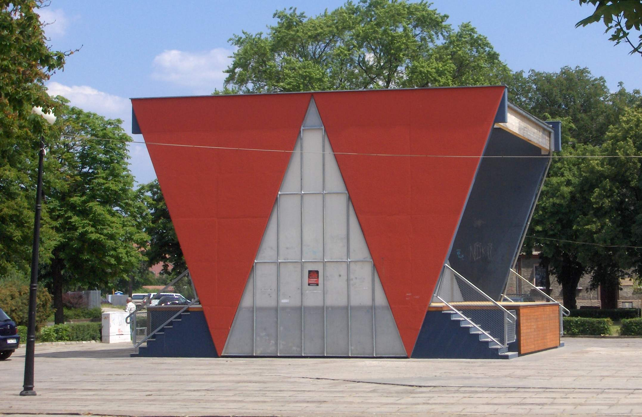 Muszla koncertowa na Placu Bohaterów w Słubicach